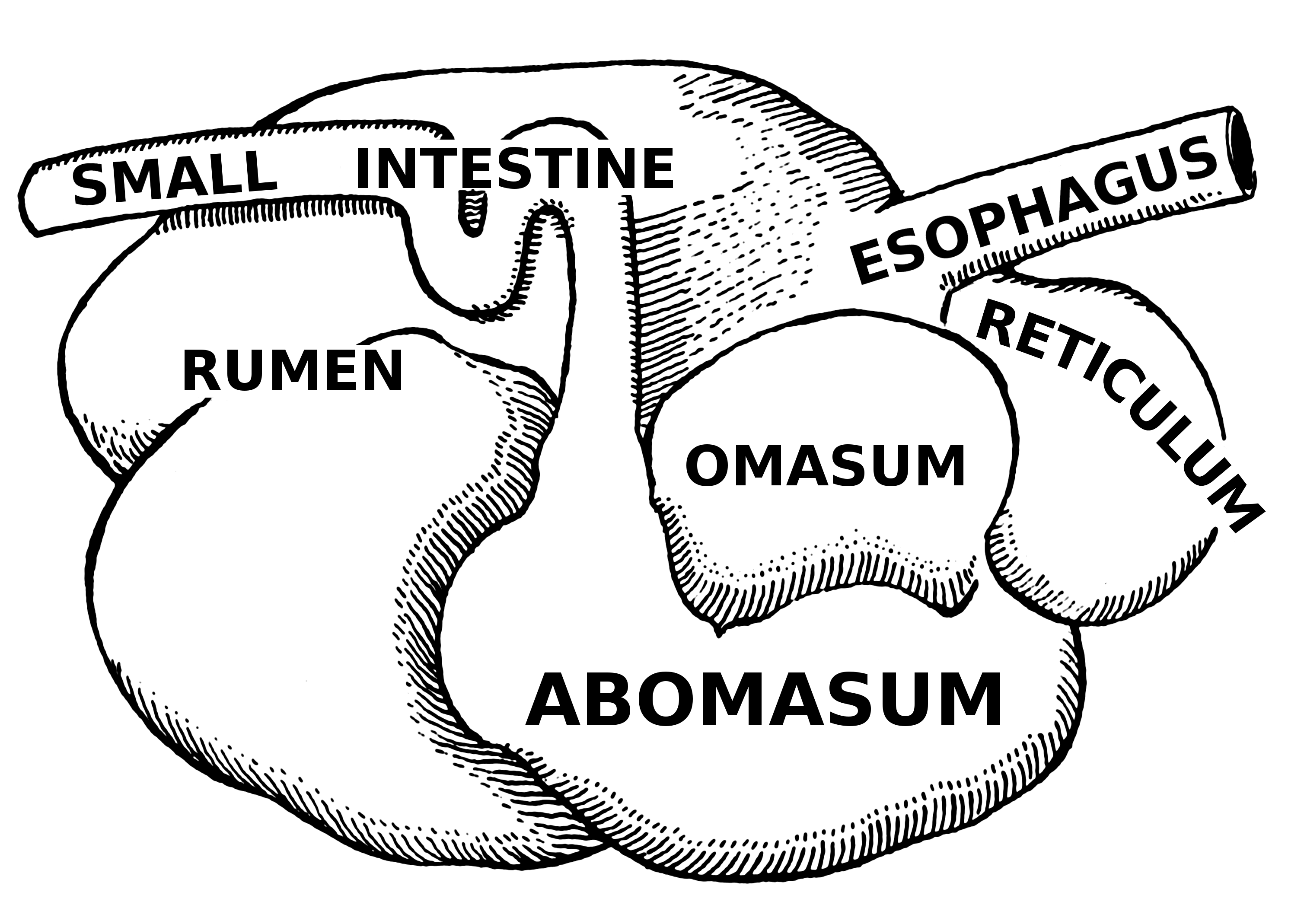 Abomasum